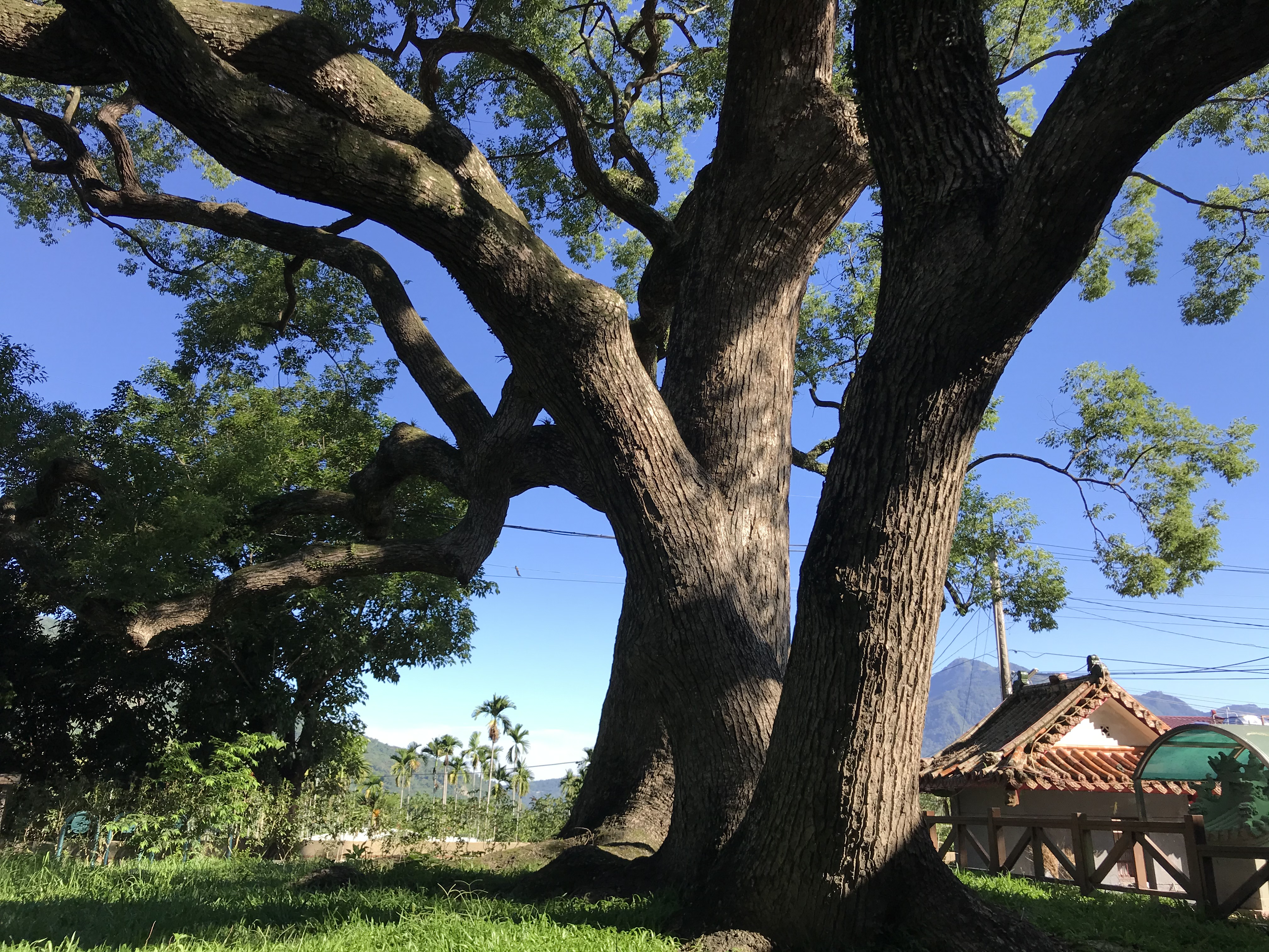 中文（台灣）: 永興大樟樹樹下